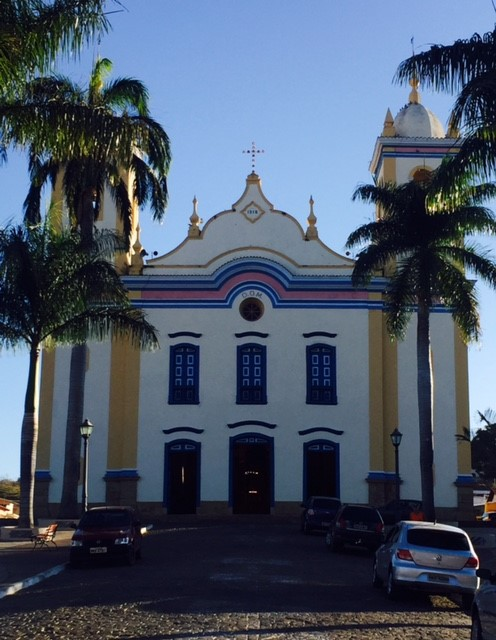 Construção imponente, finalizada em 1912